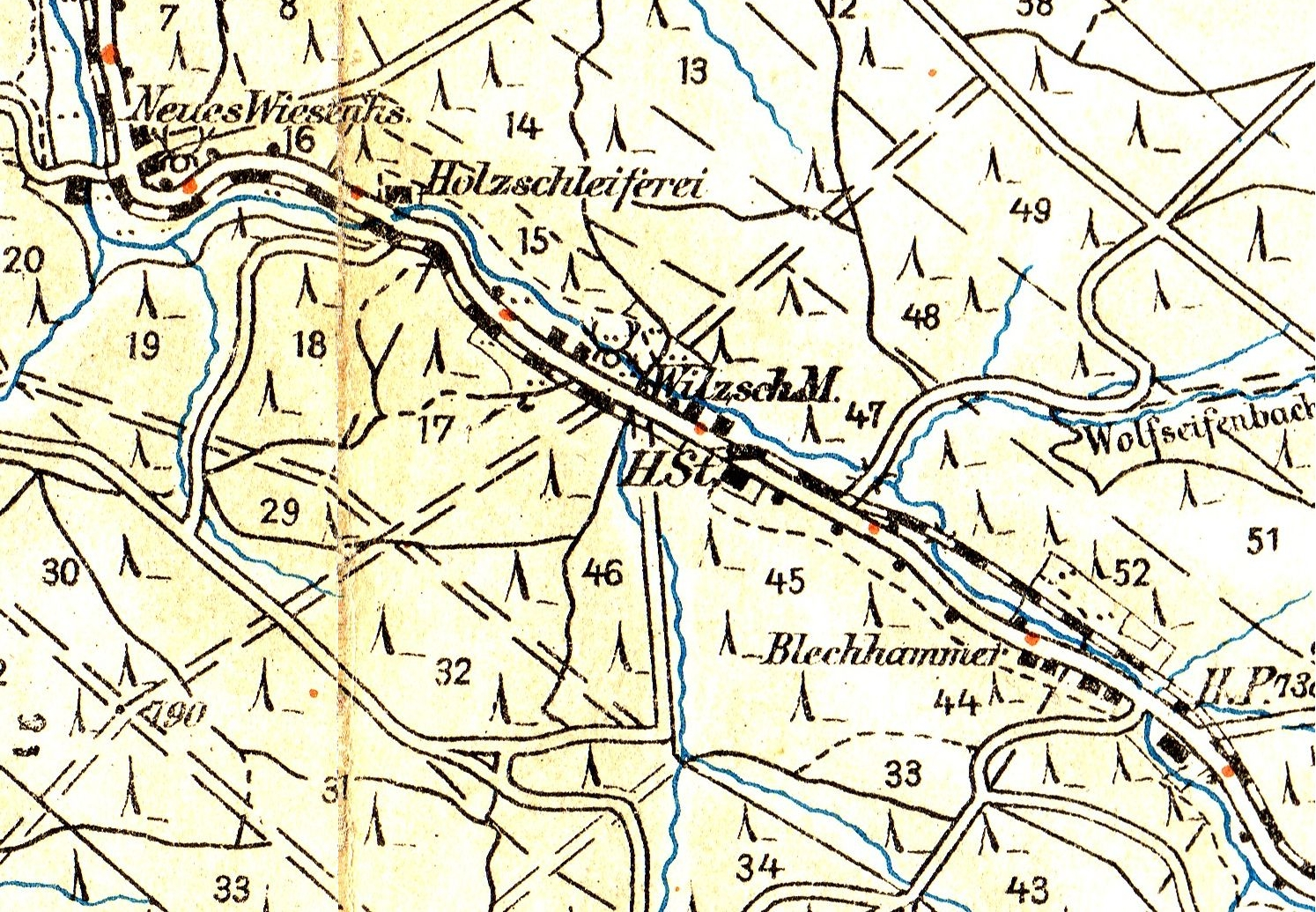 Karte von etwa 1900 mit dem Tal der Wilzsch als rechtem Seitental der Zwickauer Mulde, Maßstab 1:50.000. Herausgeben vom Erzgebirgs-Zweigverein Schönheide.